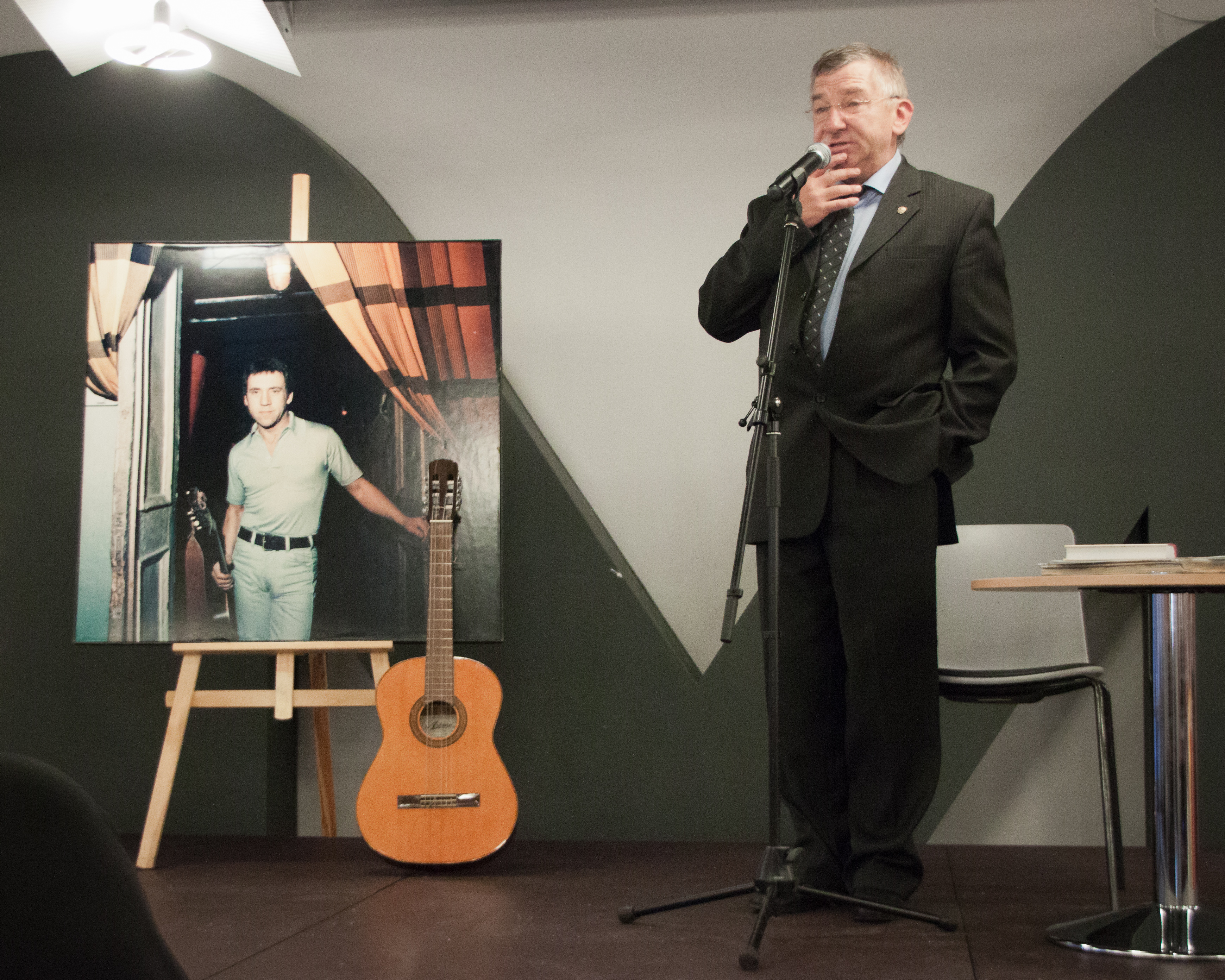 Актёр Анатолий Сергеевич Меньщиков